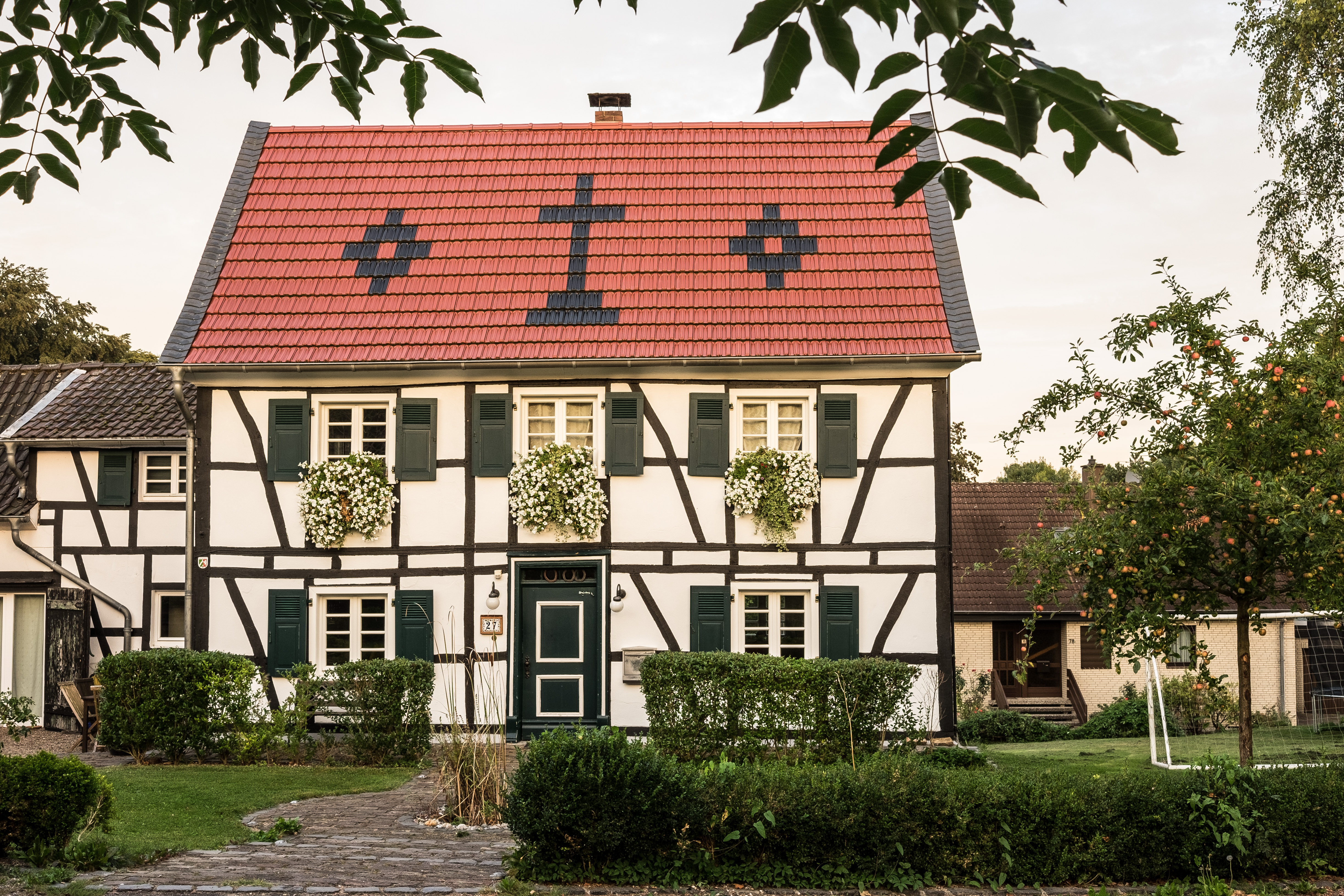 Zweiflügelige Hofanlage, Odenthal, Grüner Weg 27, Denkmal 2